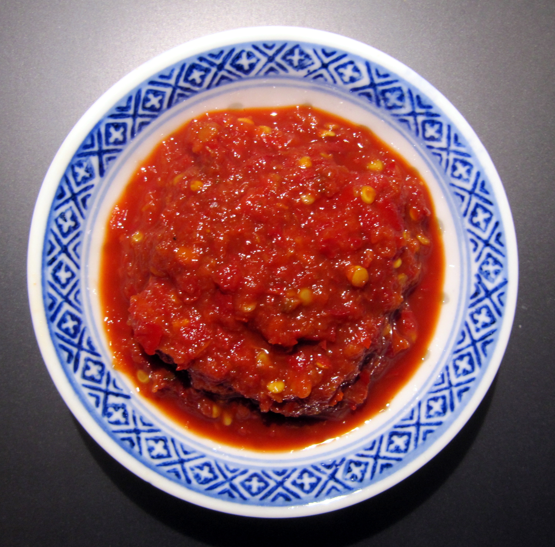 Eine Schale mit Sambal Oelek